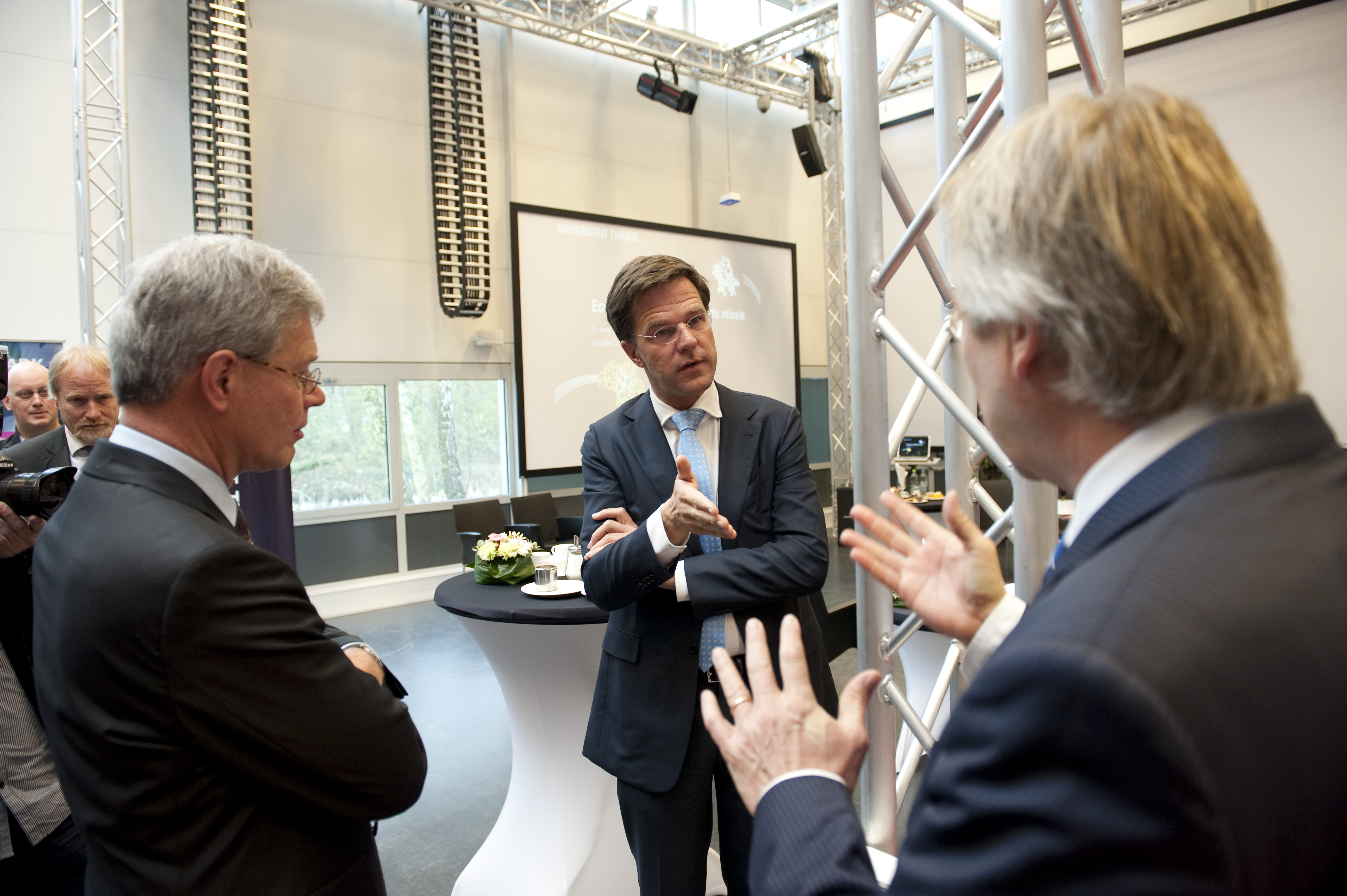 Minister-president Rutte arriveert bij de Universiteit Twente.